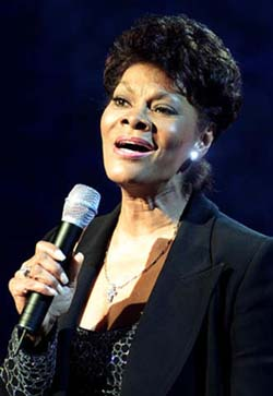 Dionne Warwick - Live